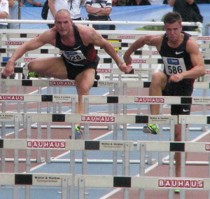 Marcel van der Westen und Alexander John beim DLV WM-Testwettkampf 2011 im Stadion der MTG Mannheim.